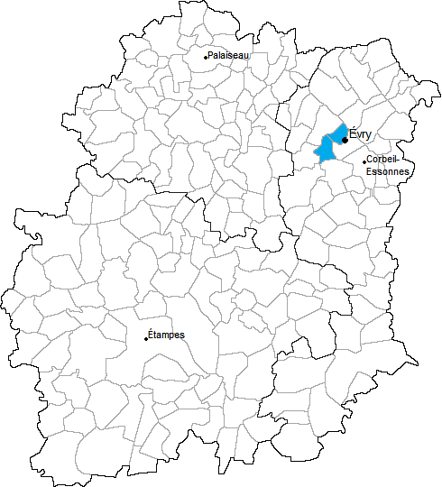 Carte de localisation du canton d'Évry-Nord en Essonne (91)